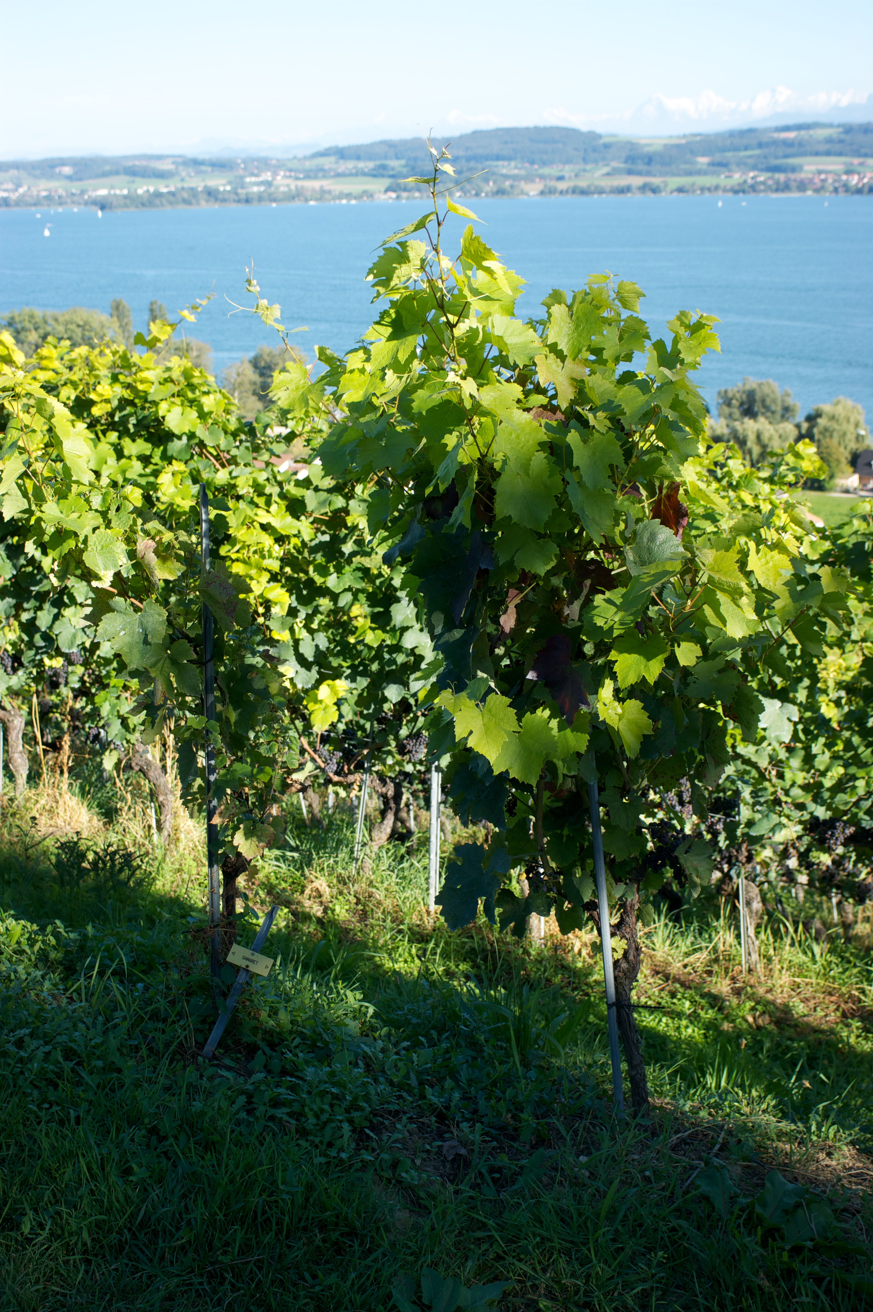 pied de vigne de cépage Gamaret dans les vignobles du Vully en suisse